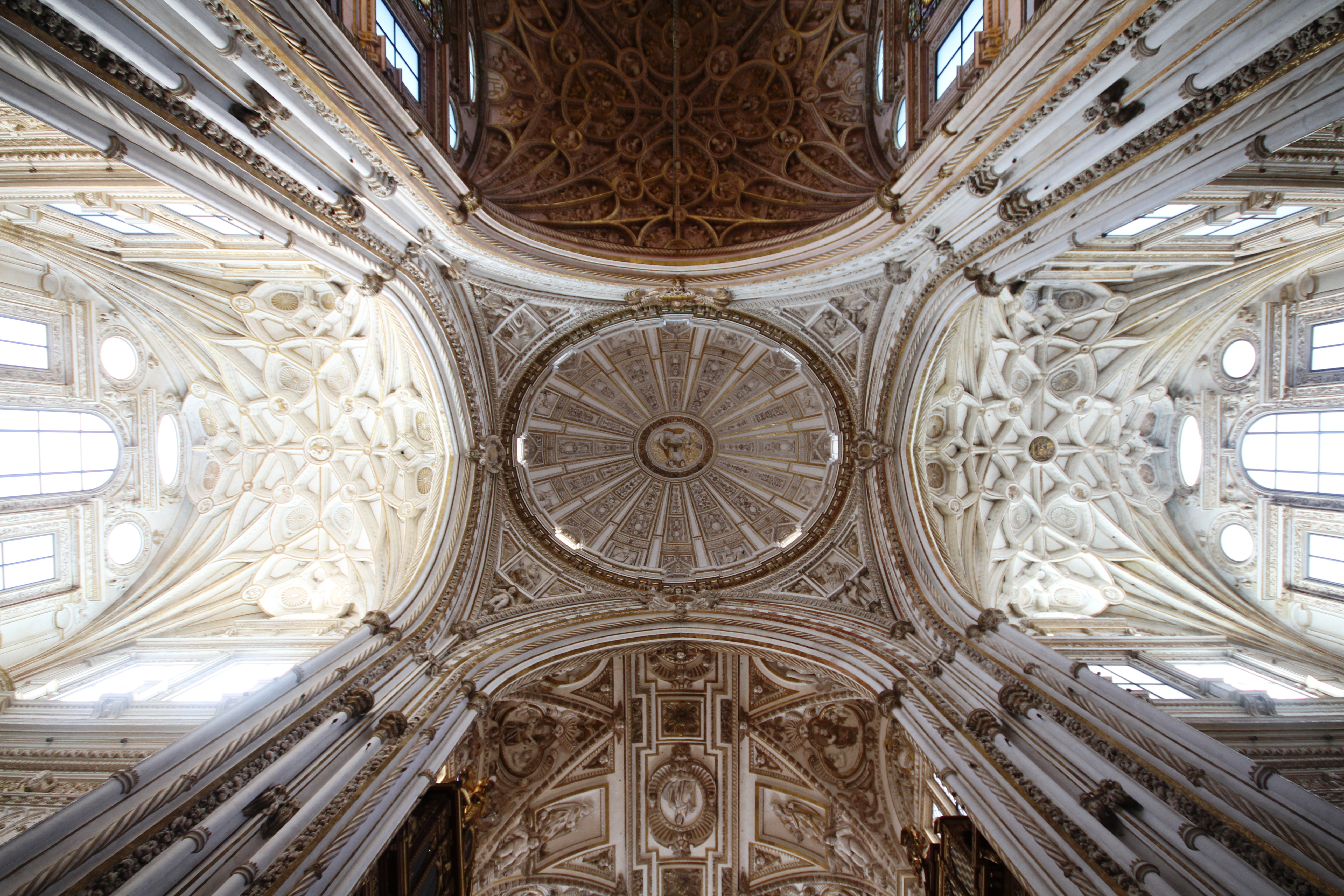 Teto da Catedral de Córdoba